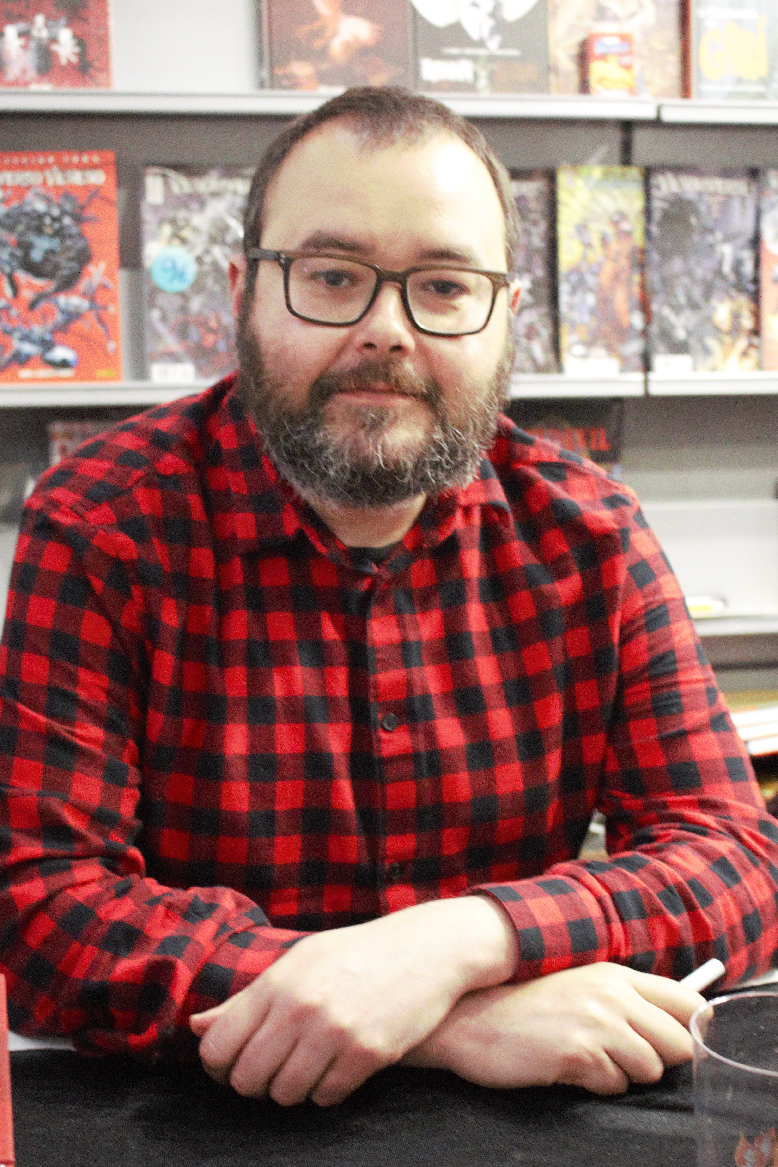 El dibuixant de còmics Albert Monteys. Saló Internacional del Còmic de Barcelona de 2018.